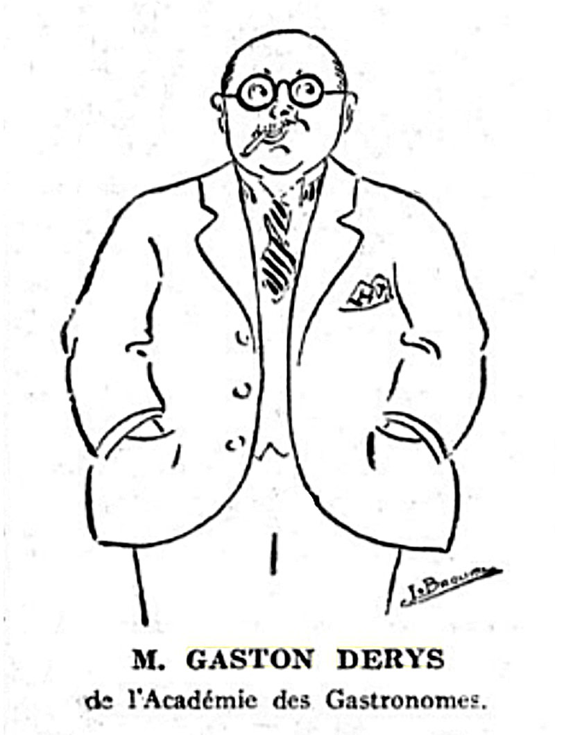 caricature de G Derys parue dans le Figaro